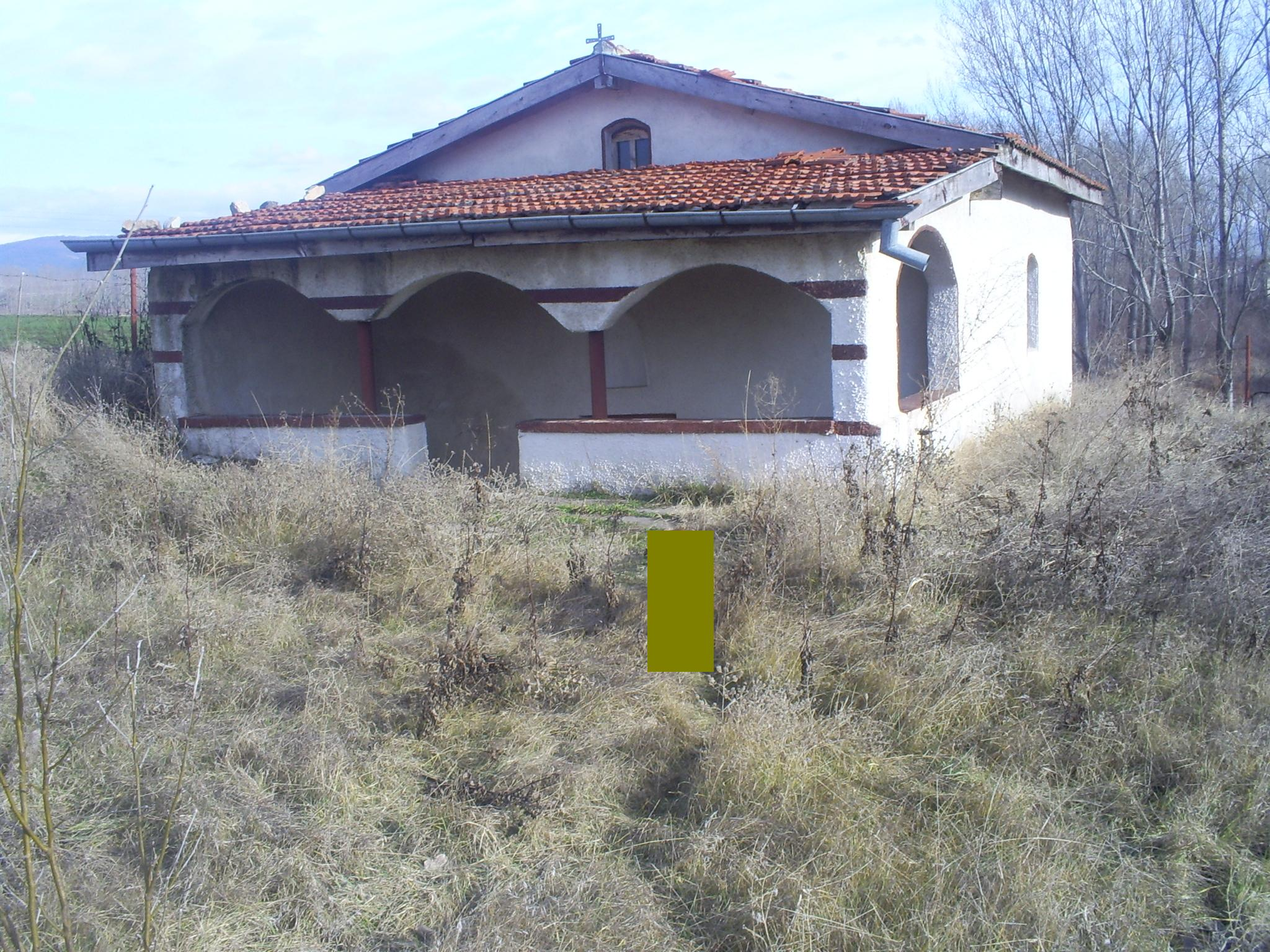 Средновековен параклис